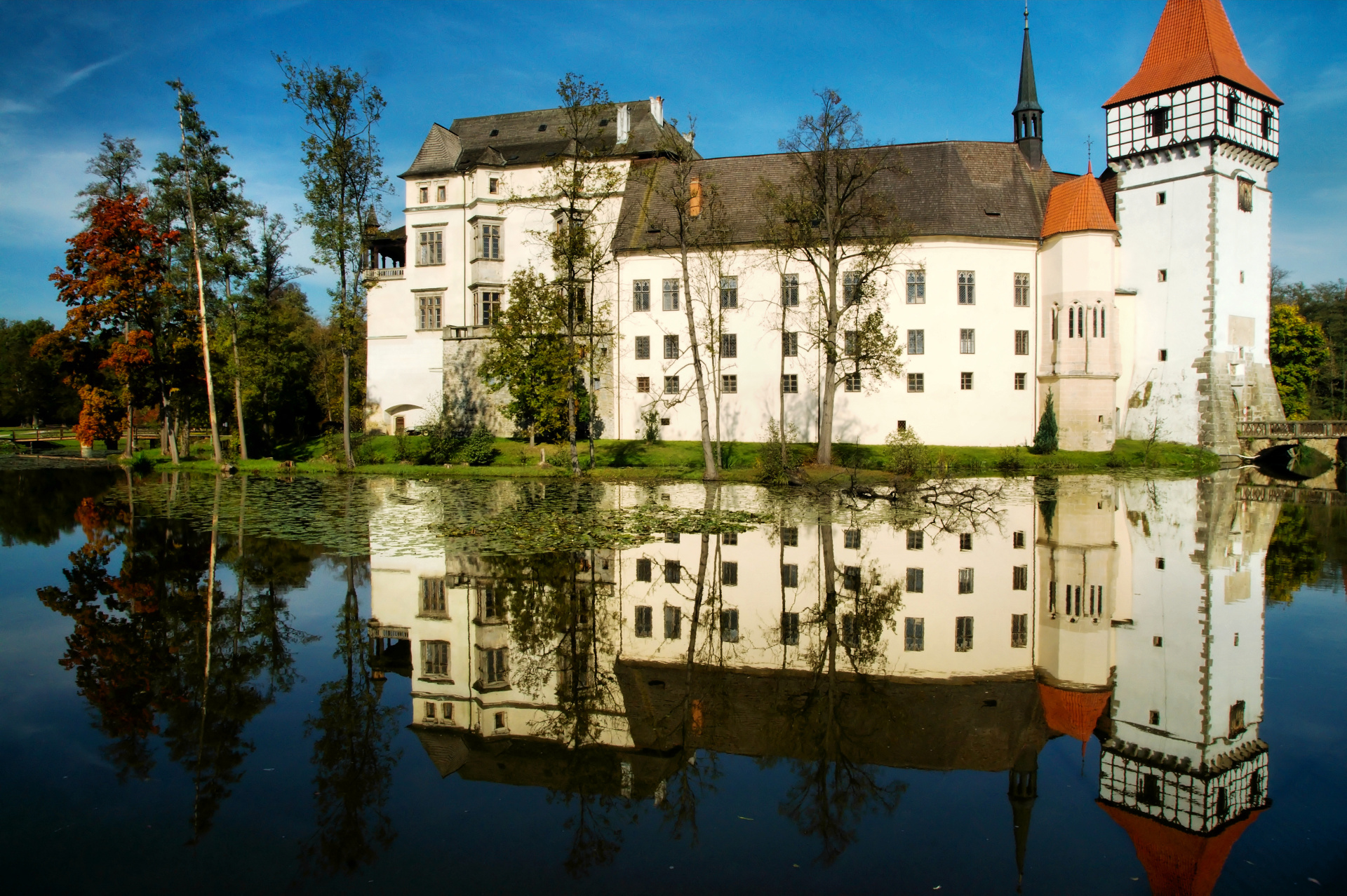 Zámek a park, s býv. panským dvorem Blatná, Blatná 320